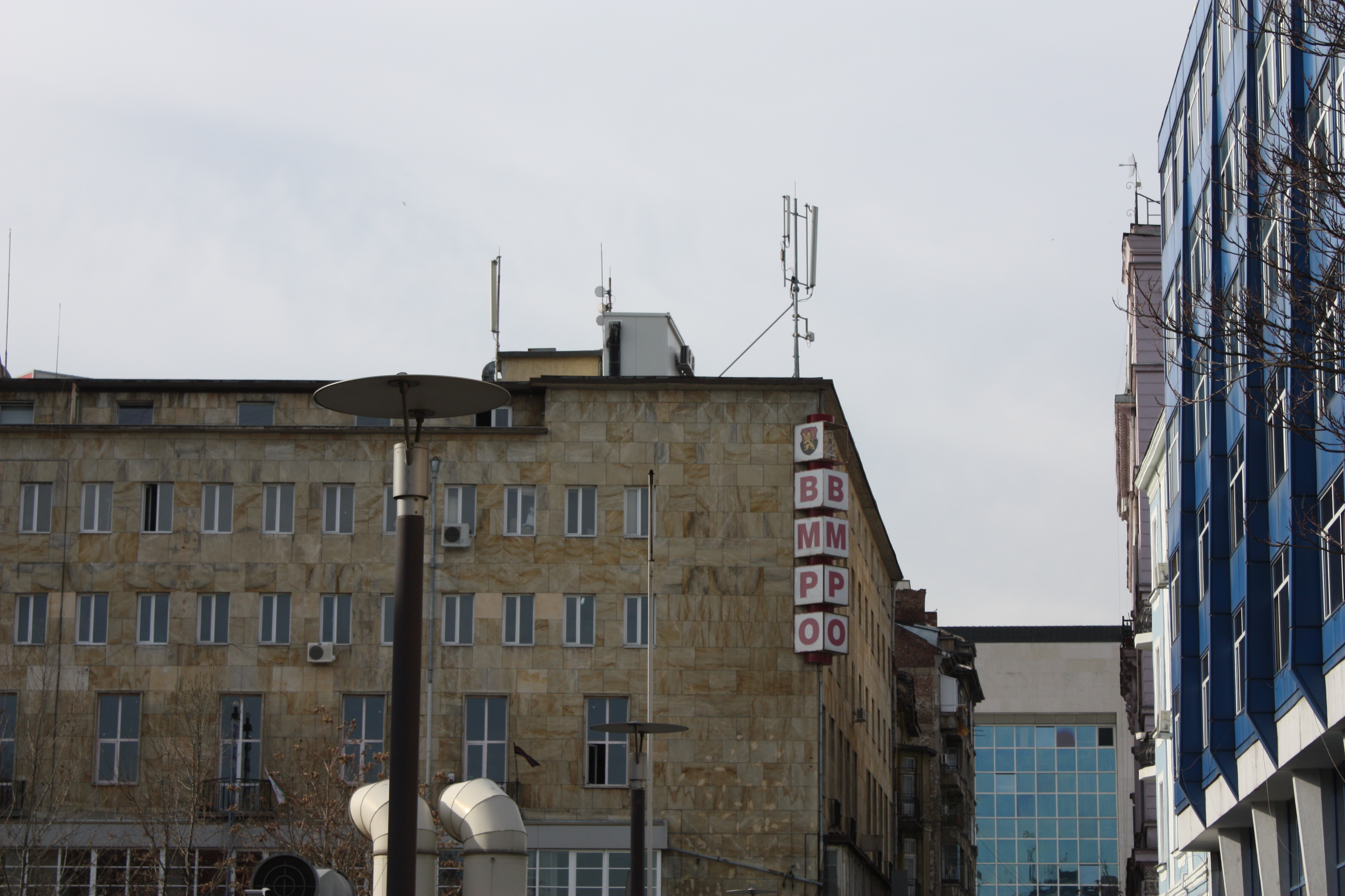 БМРО Съюз на македонските дружества Makedonja VMRO, Gebäude in der ul. Pirotska Sofia, Bulgaria